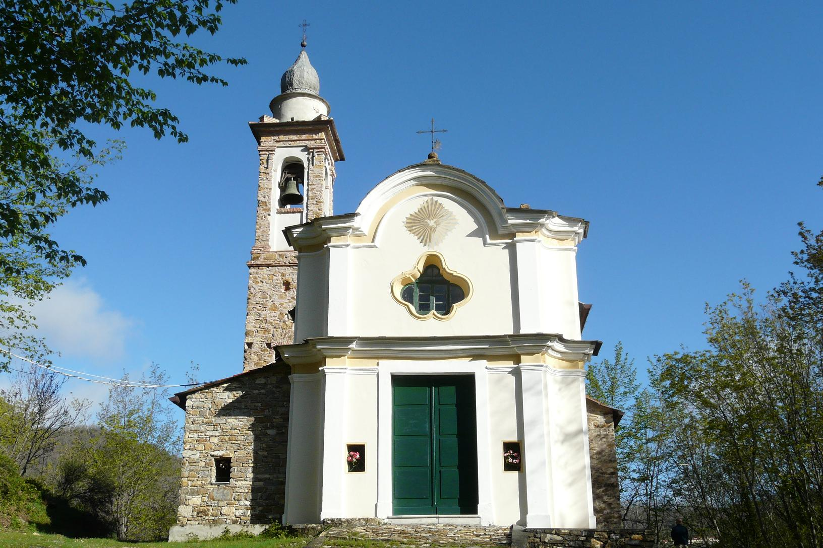 Santuario della Madonna di Loreto, Stellanello, Liguria, Italia